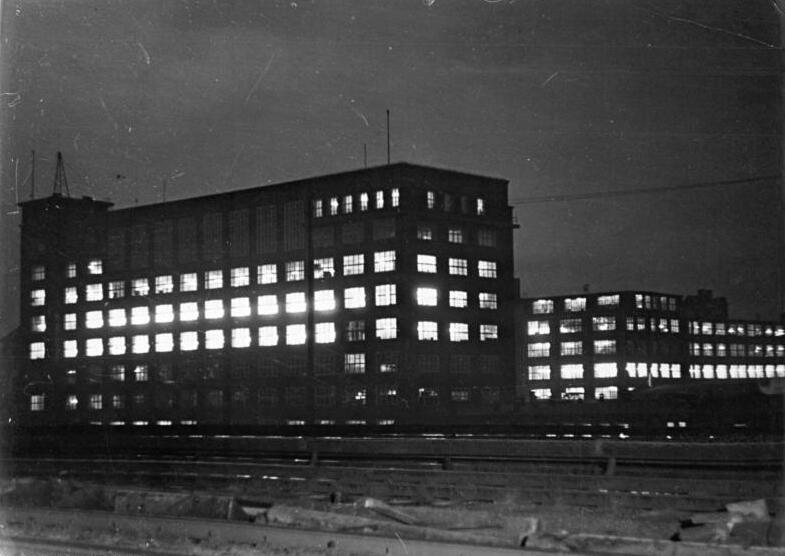 Berlin, Elektro-Apparate-Werk Treptow, Nacht Illus Richter 25.1.51 Berlin bei Nacht. UBz: Das Elektro-Apparate-Werk Treptow, ein mächtiger Bau am Ufer der Spree.